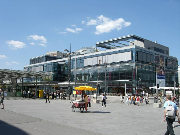 Dresden Südliche Altstadt - Wiener Platz mit Kugelhaus